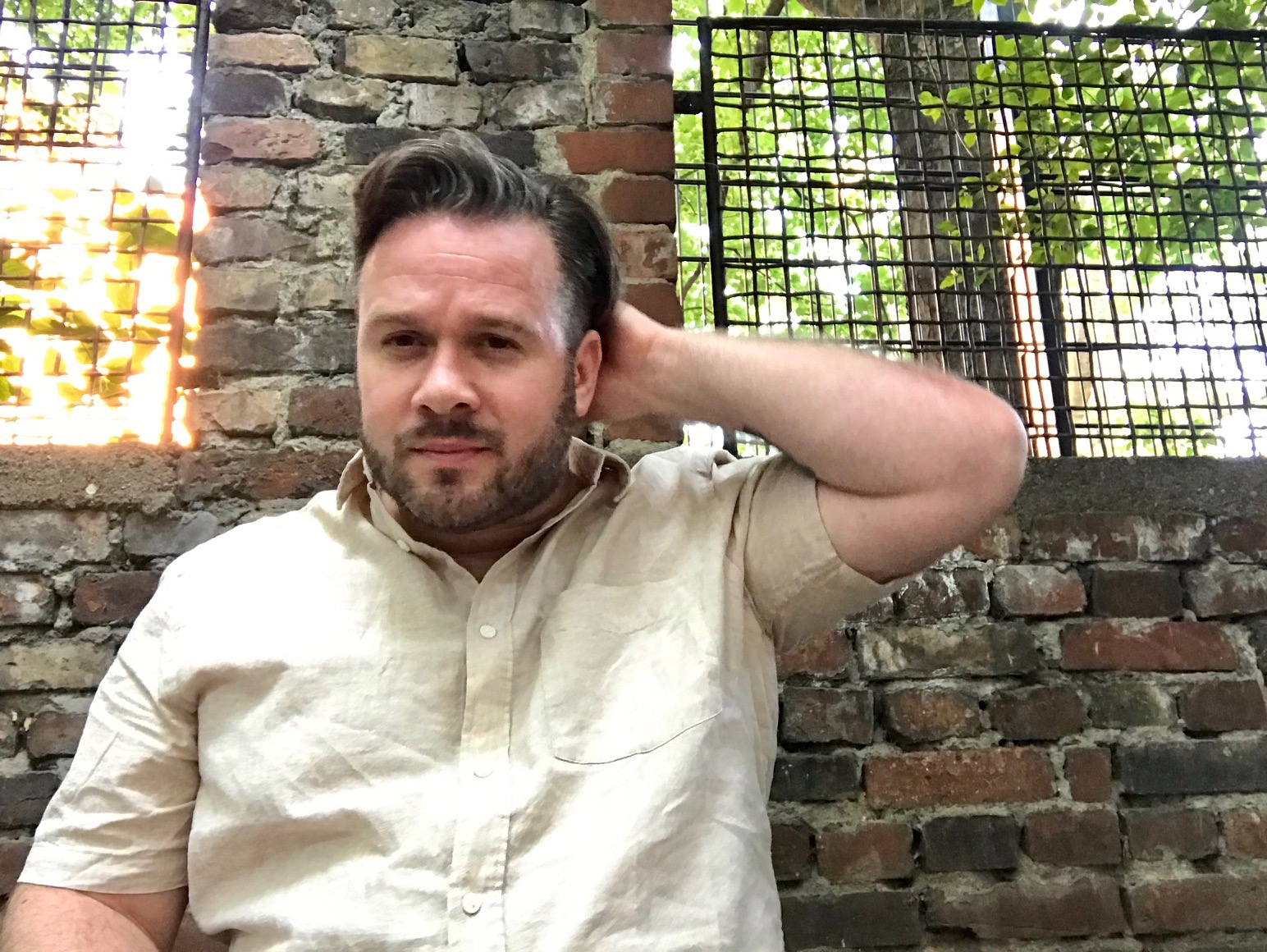 Ben Engel (2019)